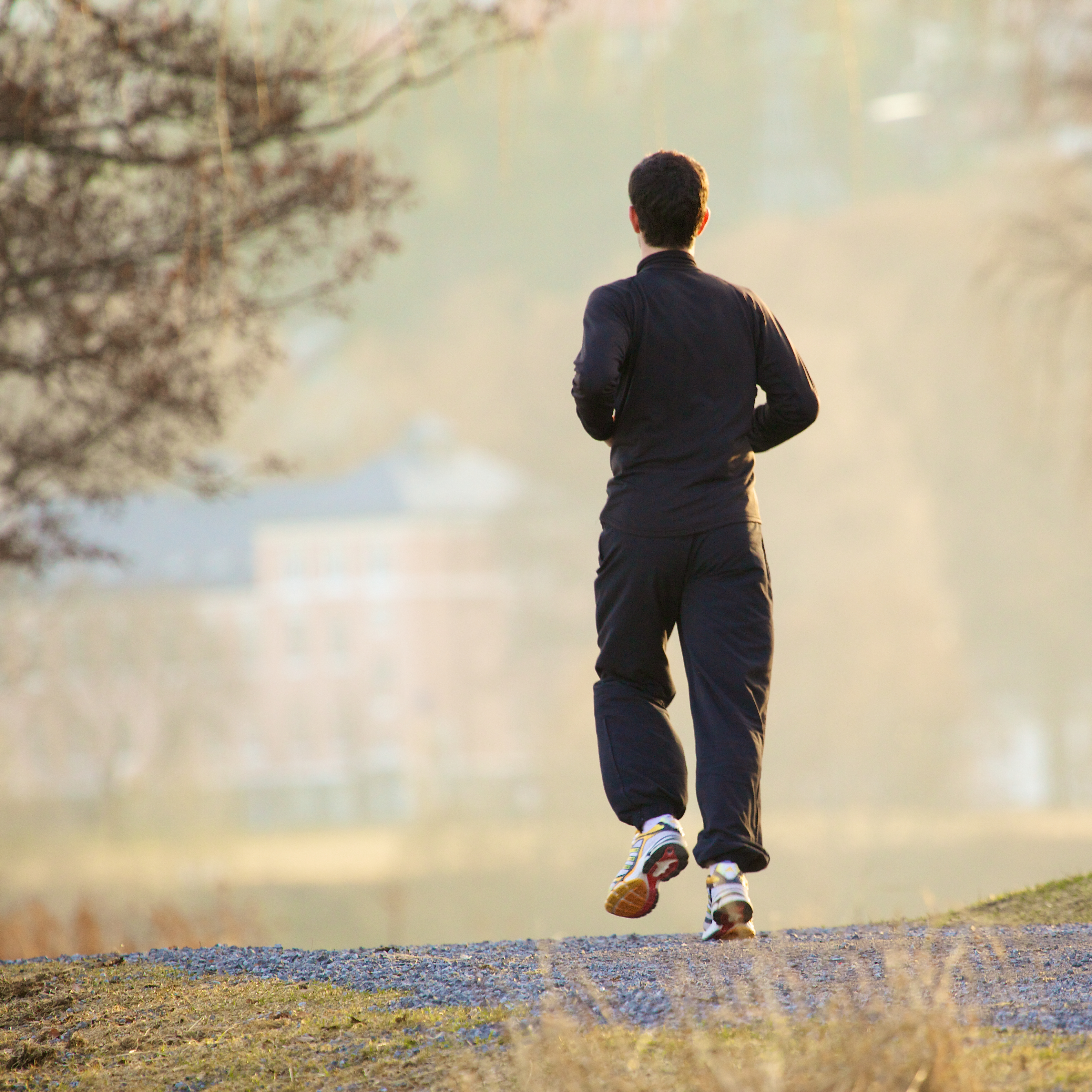 Evening jogger